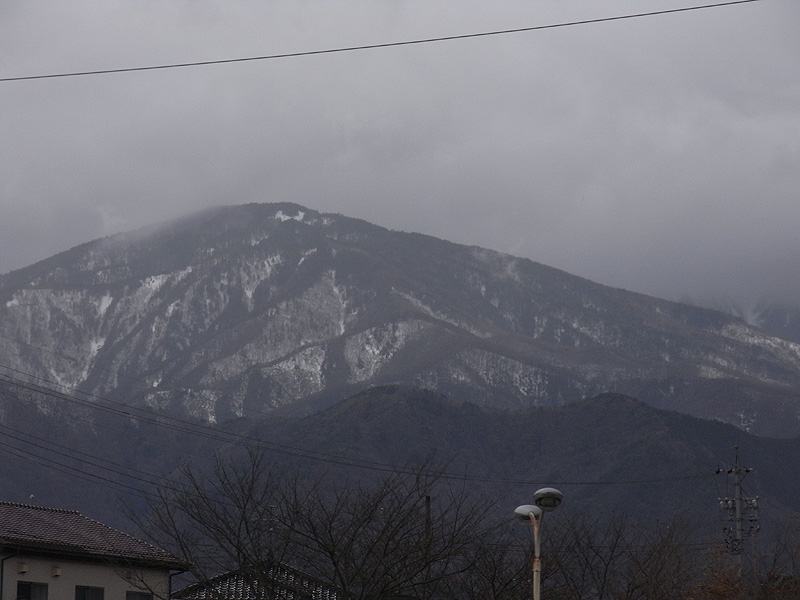 安曇野市豊科から見る鍋冠山